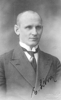 Elmar Liik